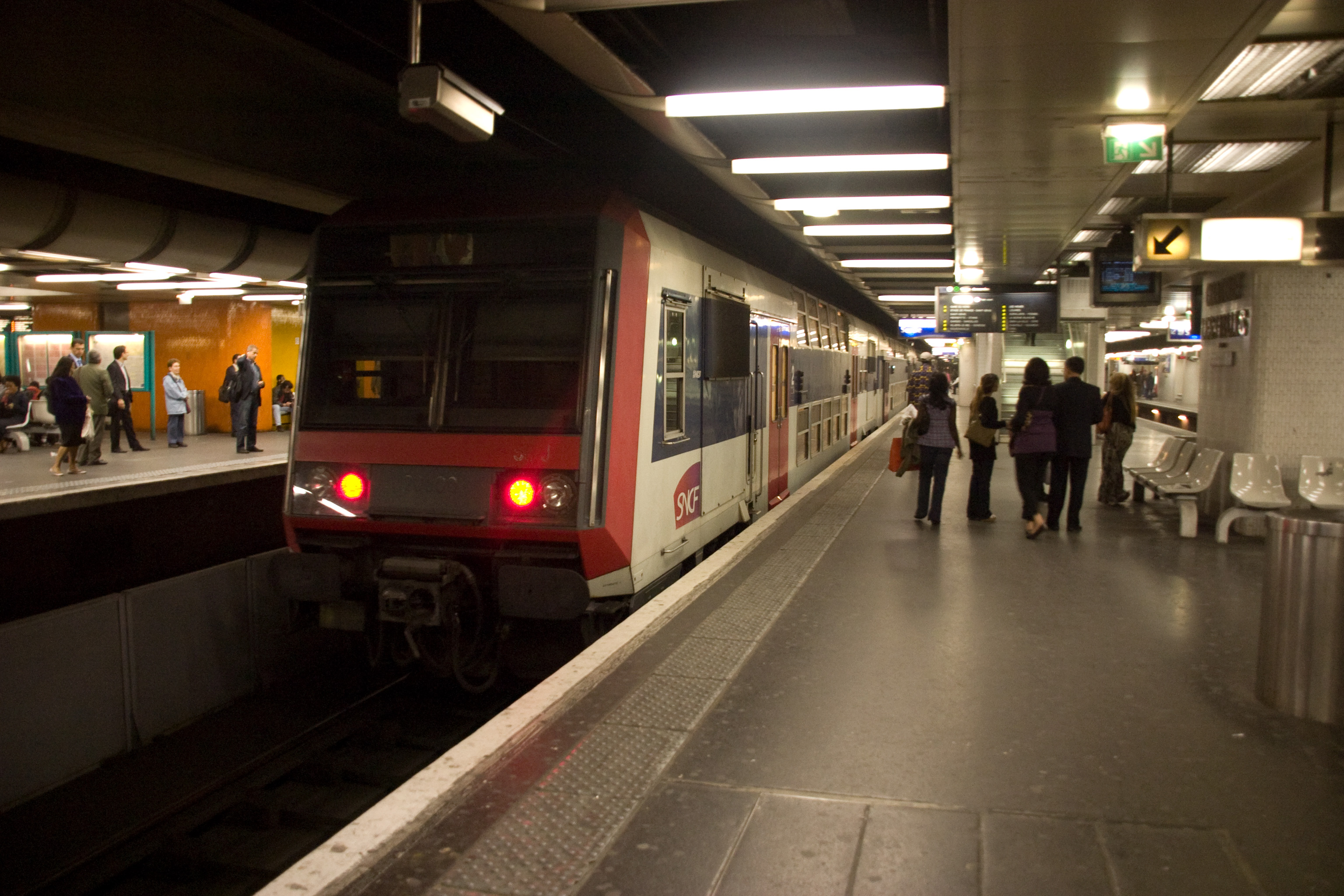 Station Châtelet - Les Halles, Paris, France